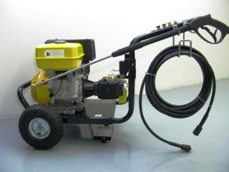 Hidrolimpiadora con motor de gasolina